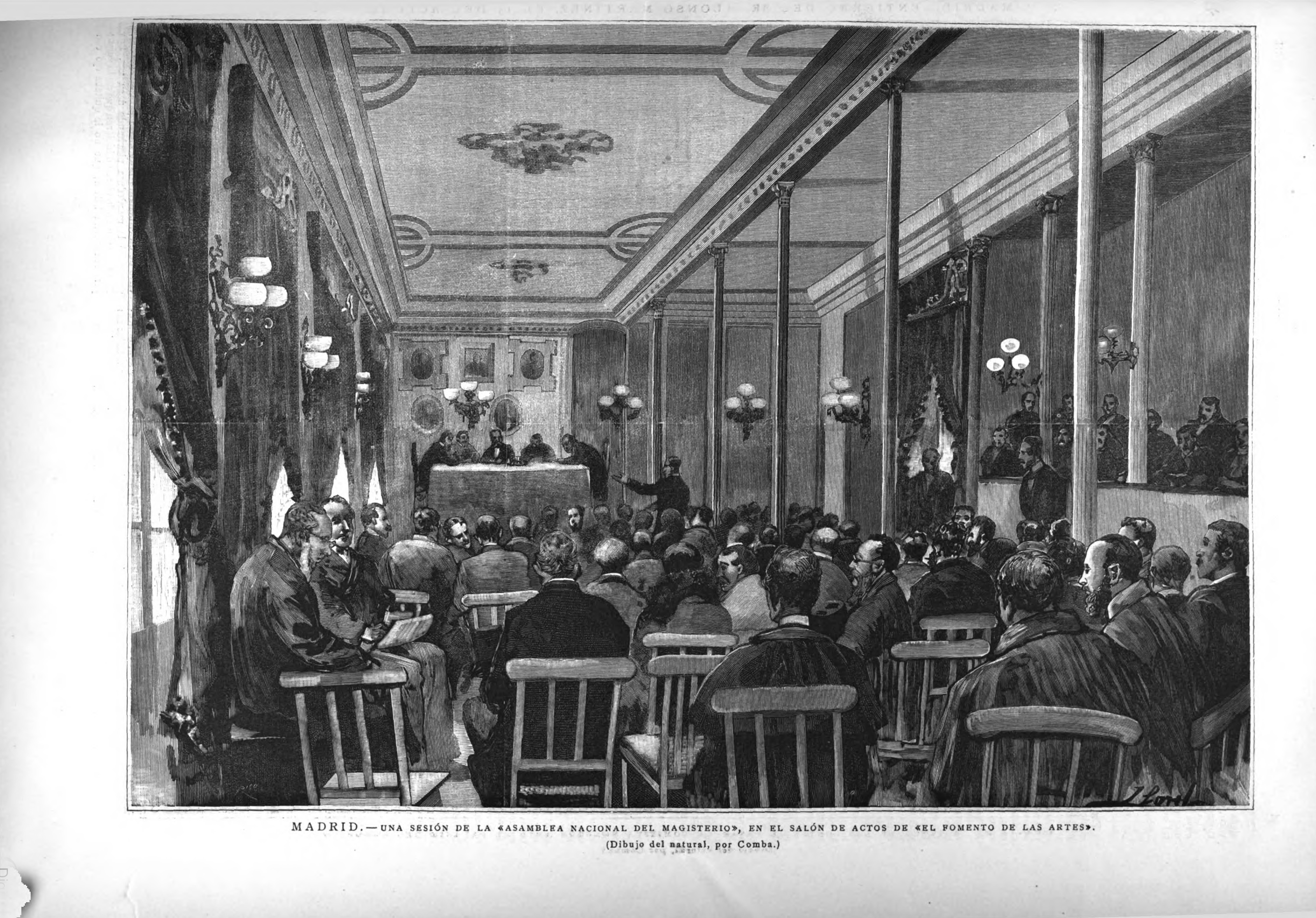 Madrid—.Una sesión de la «Asamblea Nacional del Magisterio», en el salón de actos de «El Fomento de las Artes». Dibujo del natural, por Comba.